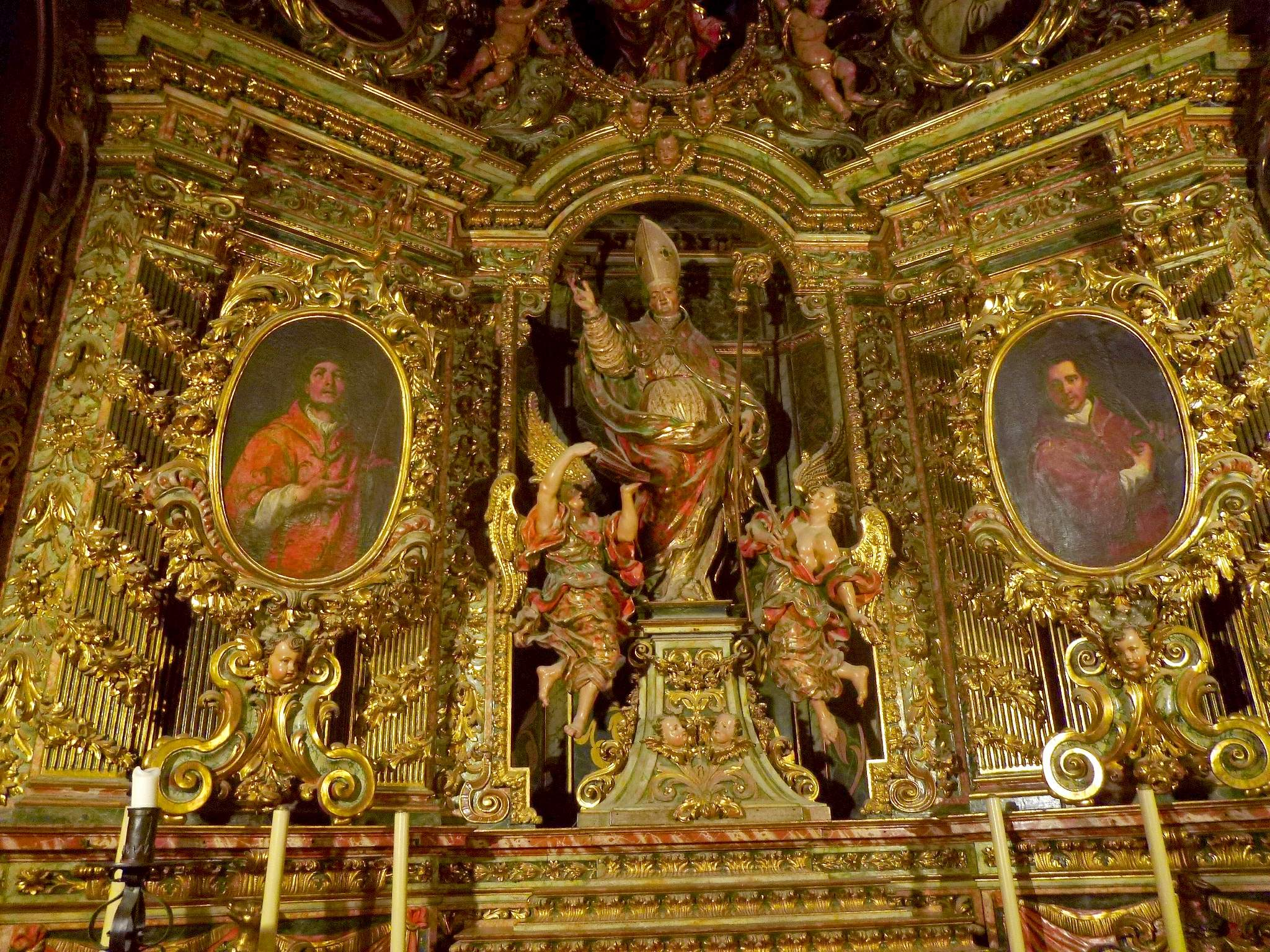 Girona - Catedral, Capilla de Sant Narcís